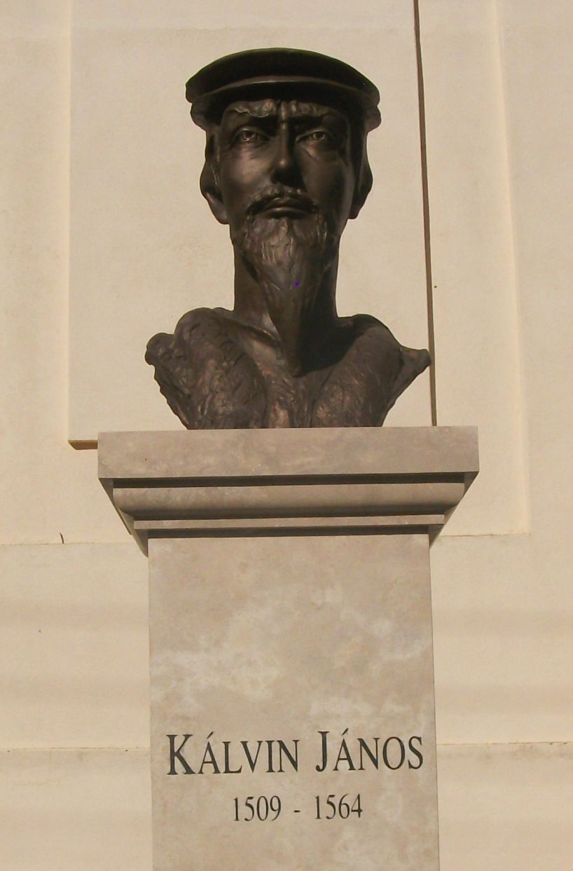 Kálvin János bronzportréja a füzesgyarmati Református templom előtt, a róla elnevezett téren. A kálvinista gyökerekkel bíró kisváros első köztéri bronzszobrának alkotója Czigándi Varga Sándor szobrászművész, aki a középkori ábrázolás elemeit hangsúlyozta művén. A szobor talapzata süttői mészkőből készült. Felavatása 2013 szeptemberében került sor.